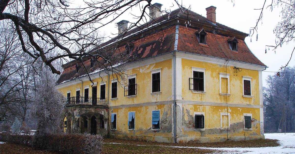 Dvorac Baruna Trenka u mjestu Trenkovo